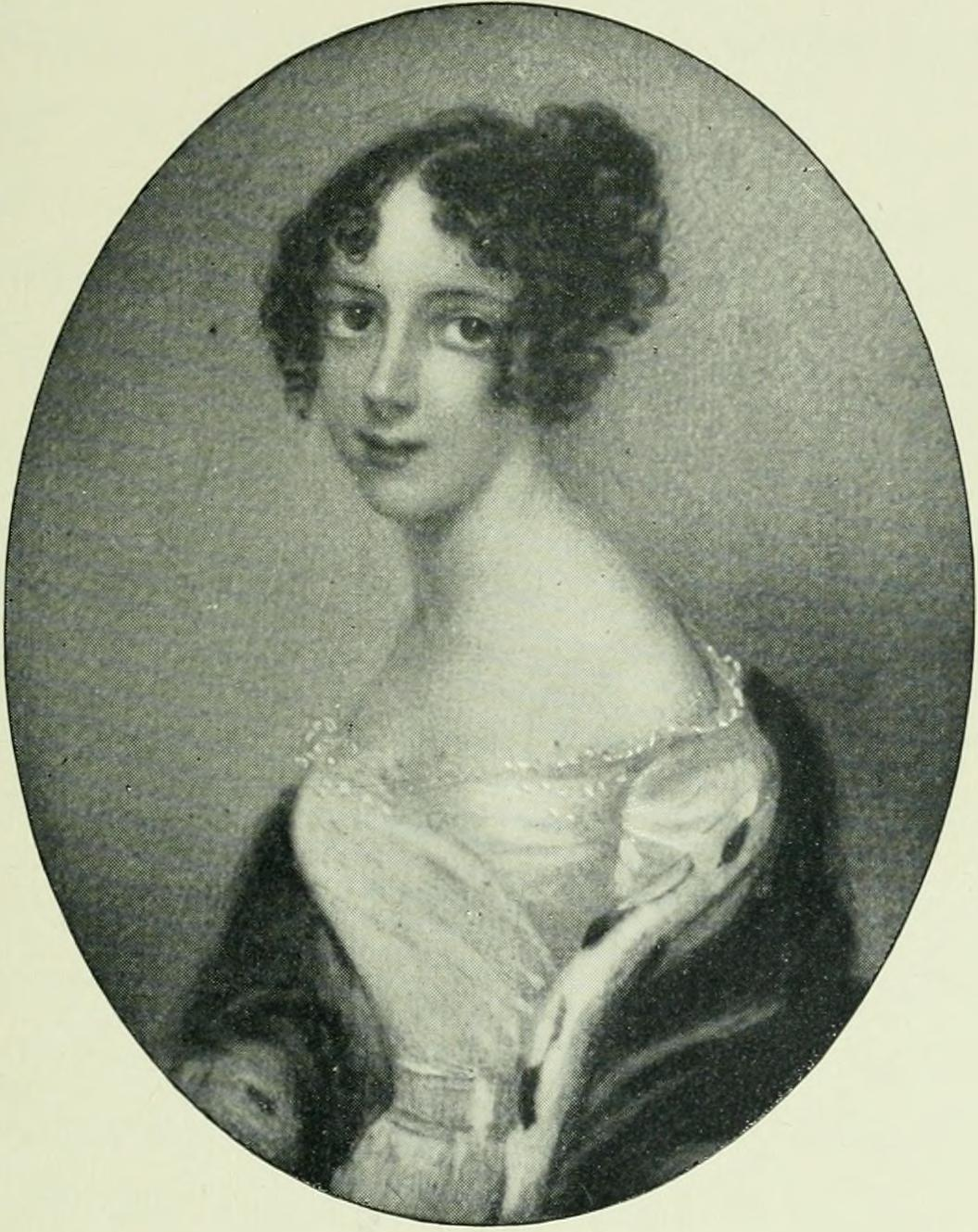 Lady Maitland